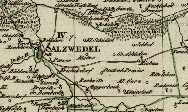 Der Kanton Salzwedel-Land (1807-13) im Departement der Elbe, Distrikt Salzwedel, Königreich Westphalen